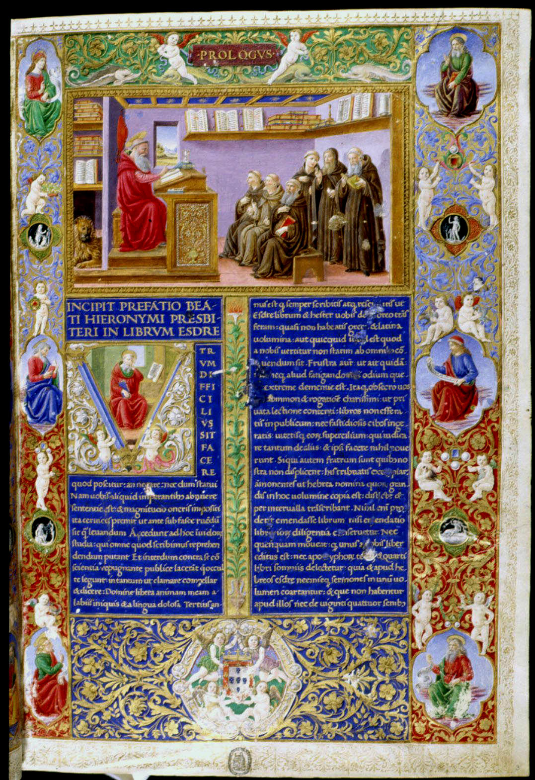 Bíblia dos Jerónimos, frontispício do Vol. III - São Jerónimo na cátedra com um grupo de frades